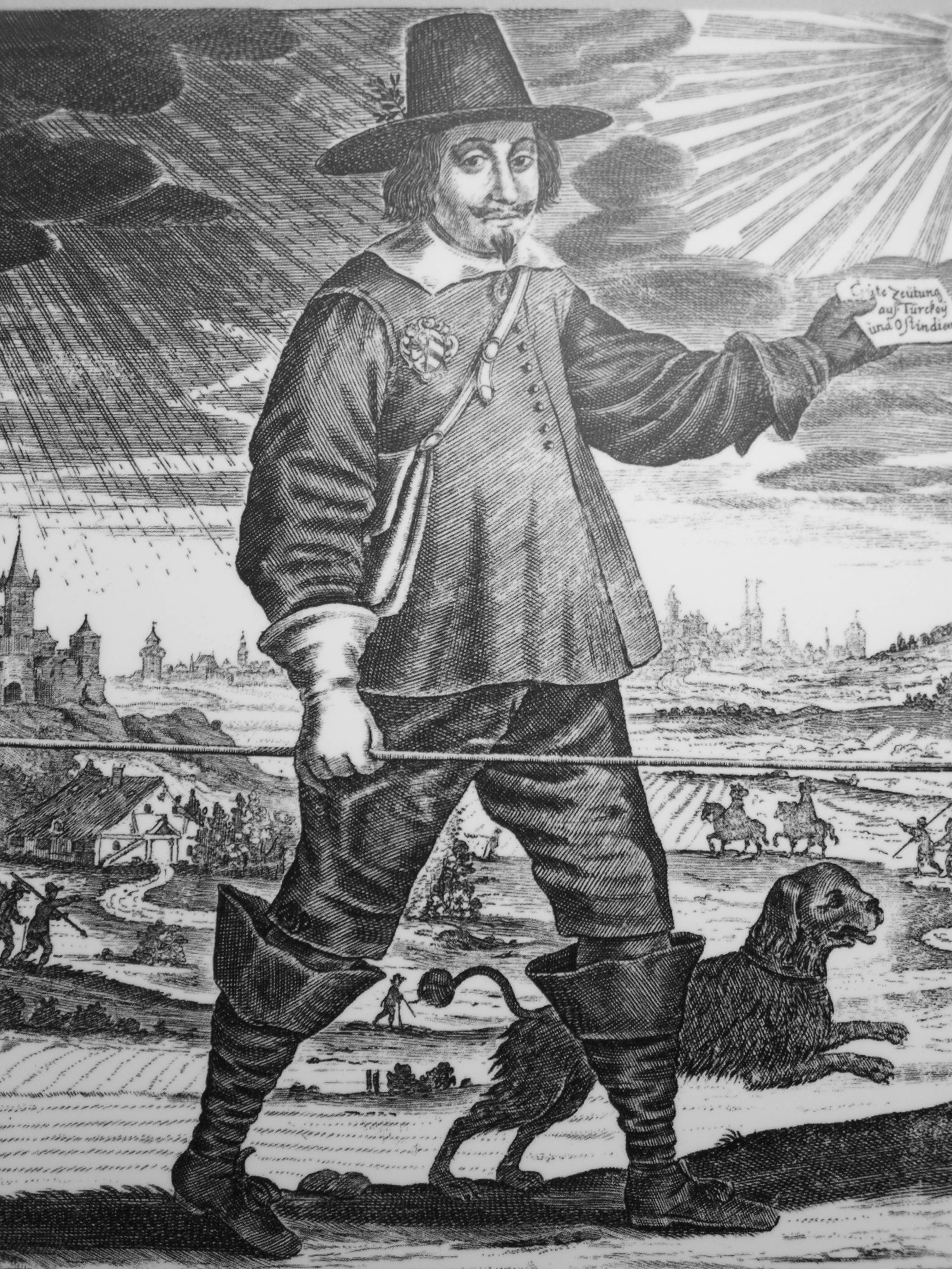 Postbote mit Botenspiess (17. Jahrhundert), Buchillustration in O. Veredarius: Das Buch von der Weltpost, Berlin 1885. Exponat im Deutschen Museum Verkehrszentrum München (Halle II)